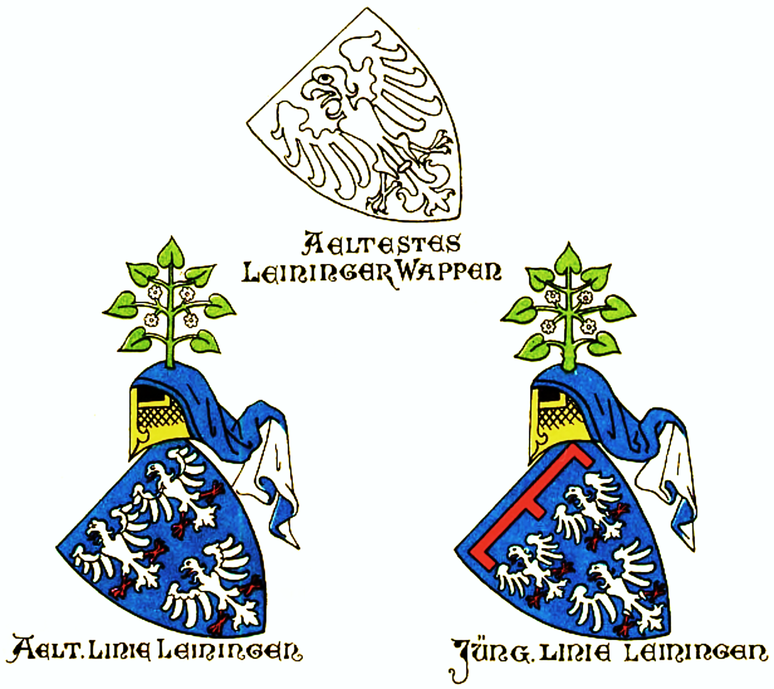 Stammwappen der Grafen, späteren Fürsten zu Leiningen